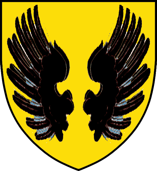 Vapensköld för svenska adelsätten Brahe